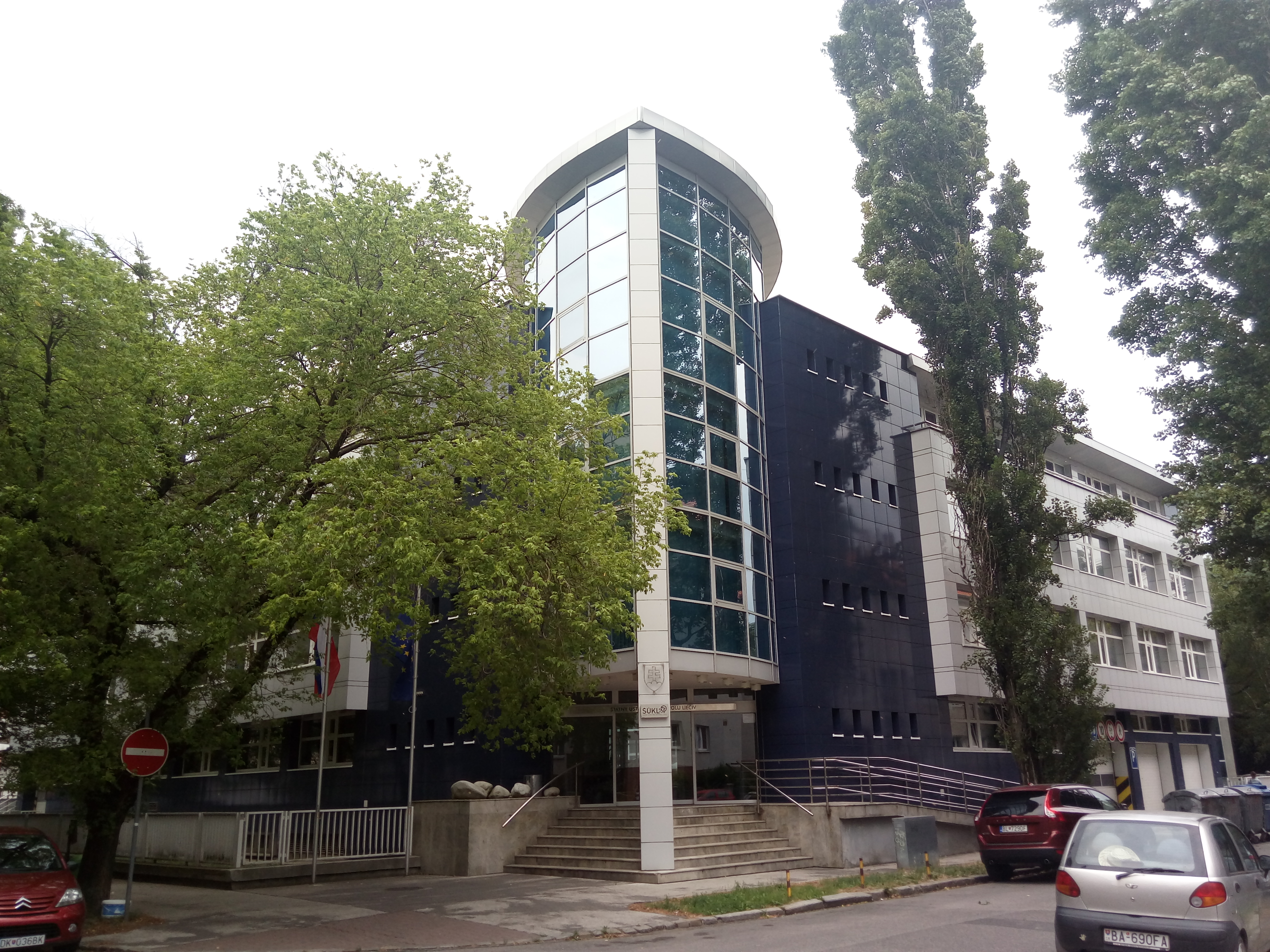 Štátny ústav pre kontrolu liečiv, Kvetná 11, Rastislavova, Bratislava